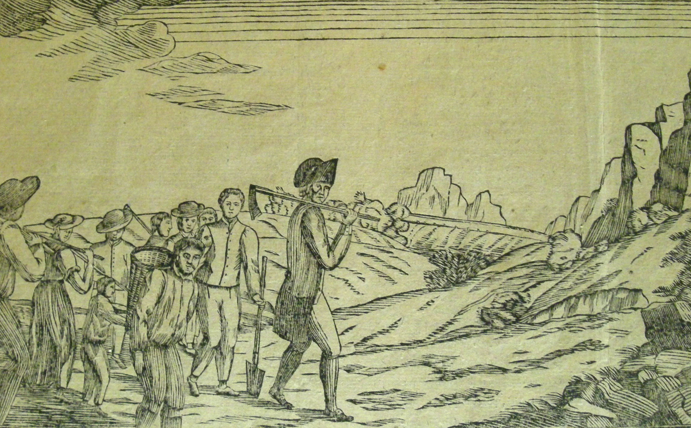 "Le pasteur travaillant sur un chemin" : Gravure de 1819 représentant le pasteur Oberlin au travail. Illustration de l'almanach Le Patriarche de l'agriculture française - Musée Jean-Frédéric Oberlin à Waldersbach)